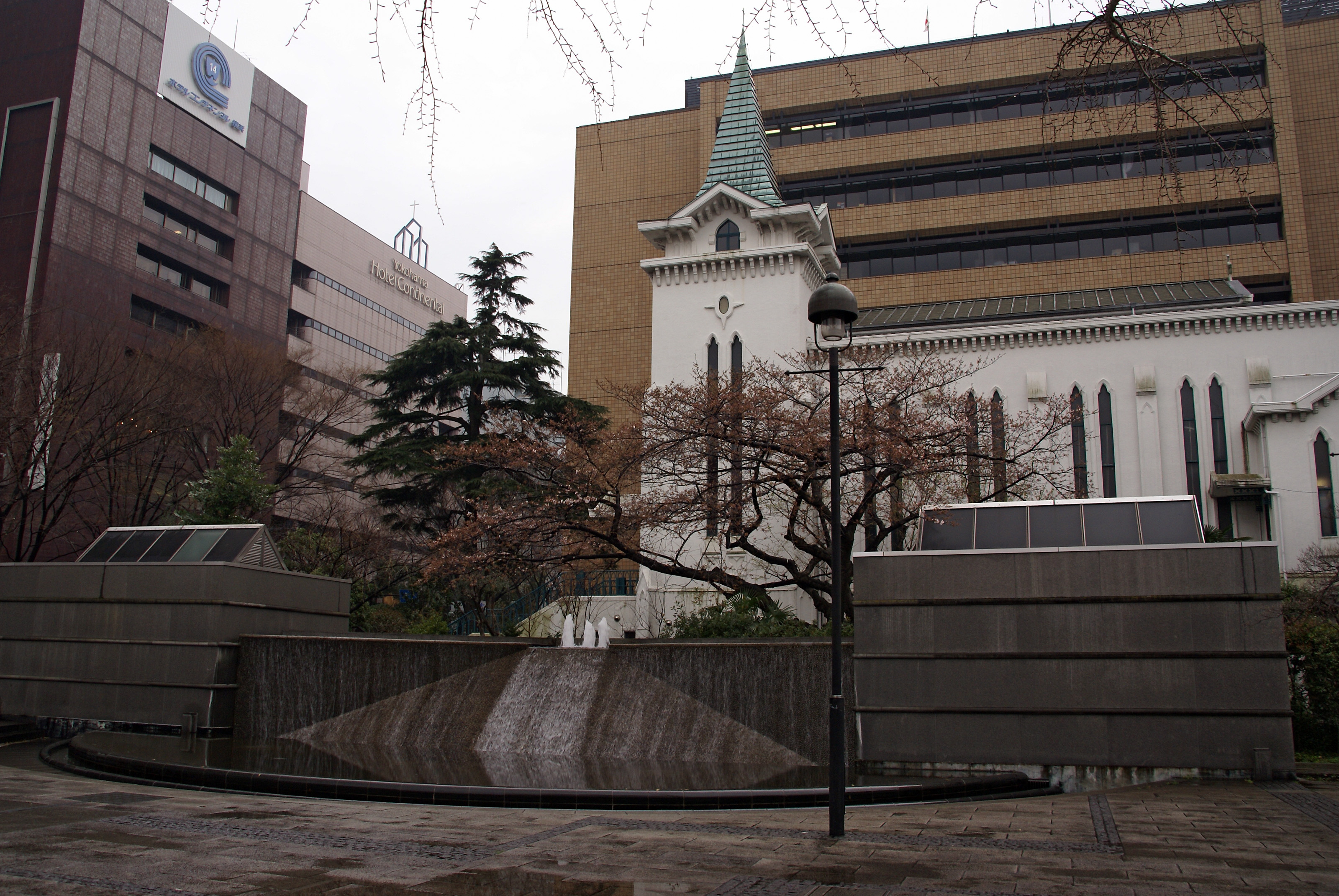 Yokohama Kaigan church in Yokohama, Japan